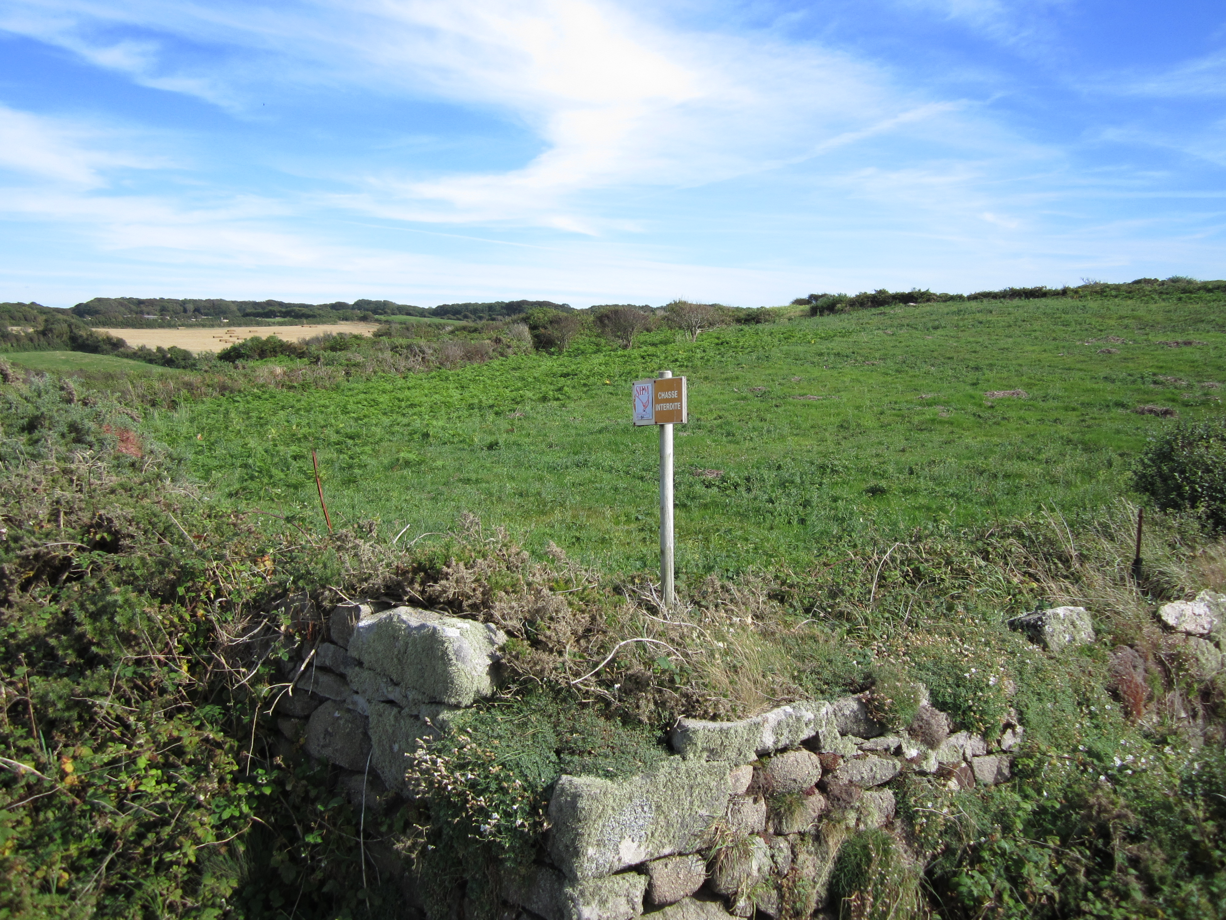 Camp du Castel (ancien rempart de terre affaissé comportant en son centre un réseau de pièces de bois carbonisées) .